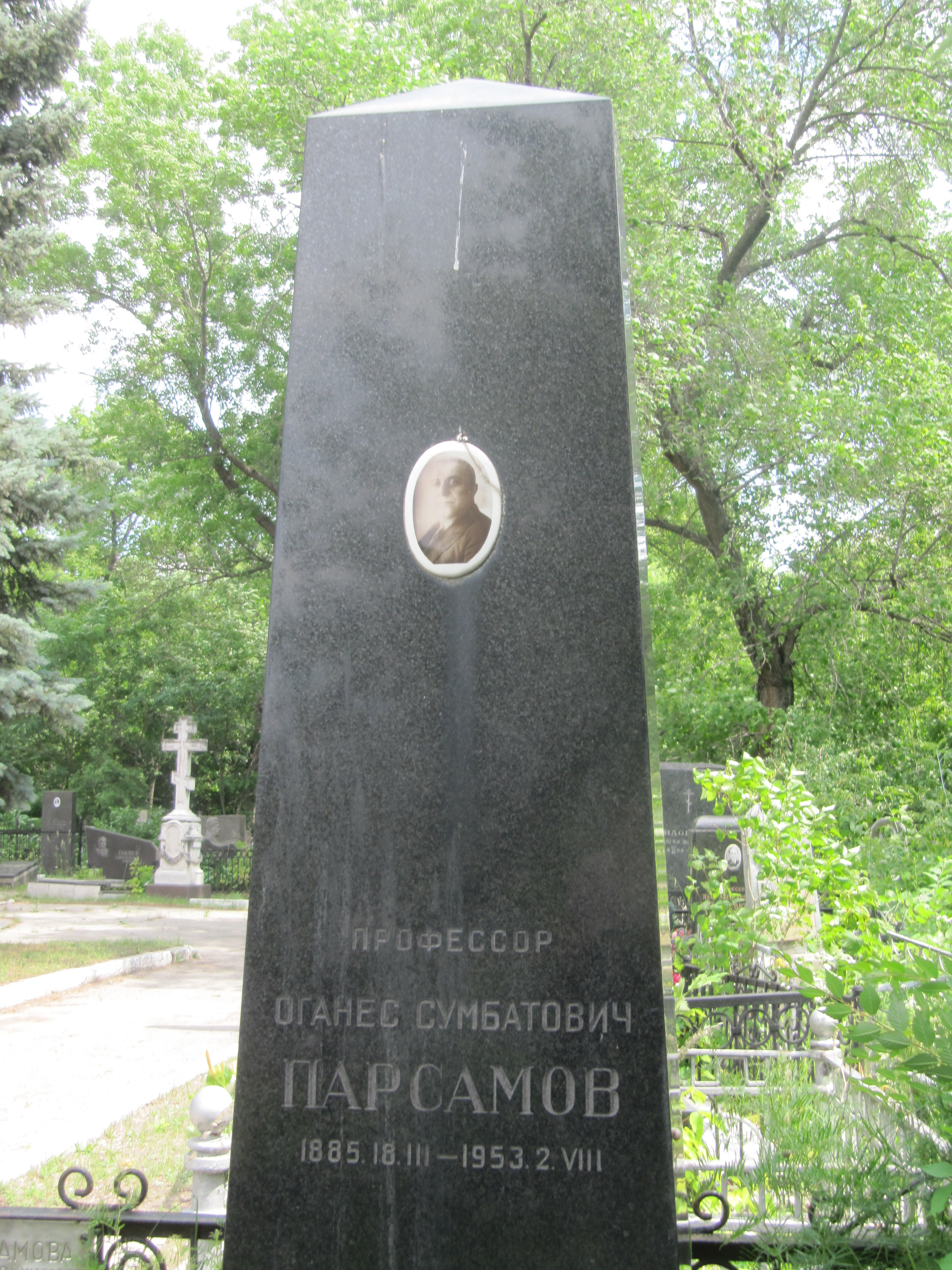 Парсамов О.С., памятник на могиле, Воскресенское кладбище (3-й участок), Саратов.